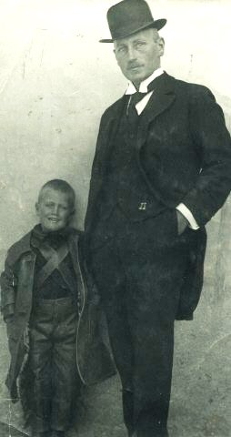 Arthur Posnansky con su hijo Manuel Posnansky